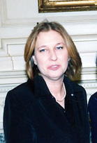 Israeli Foreign Minister Tzipi Livni.